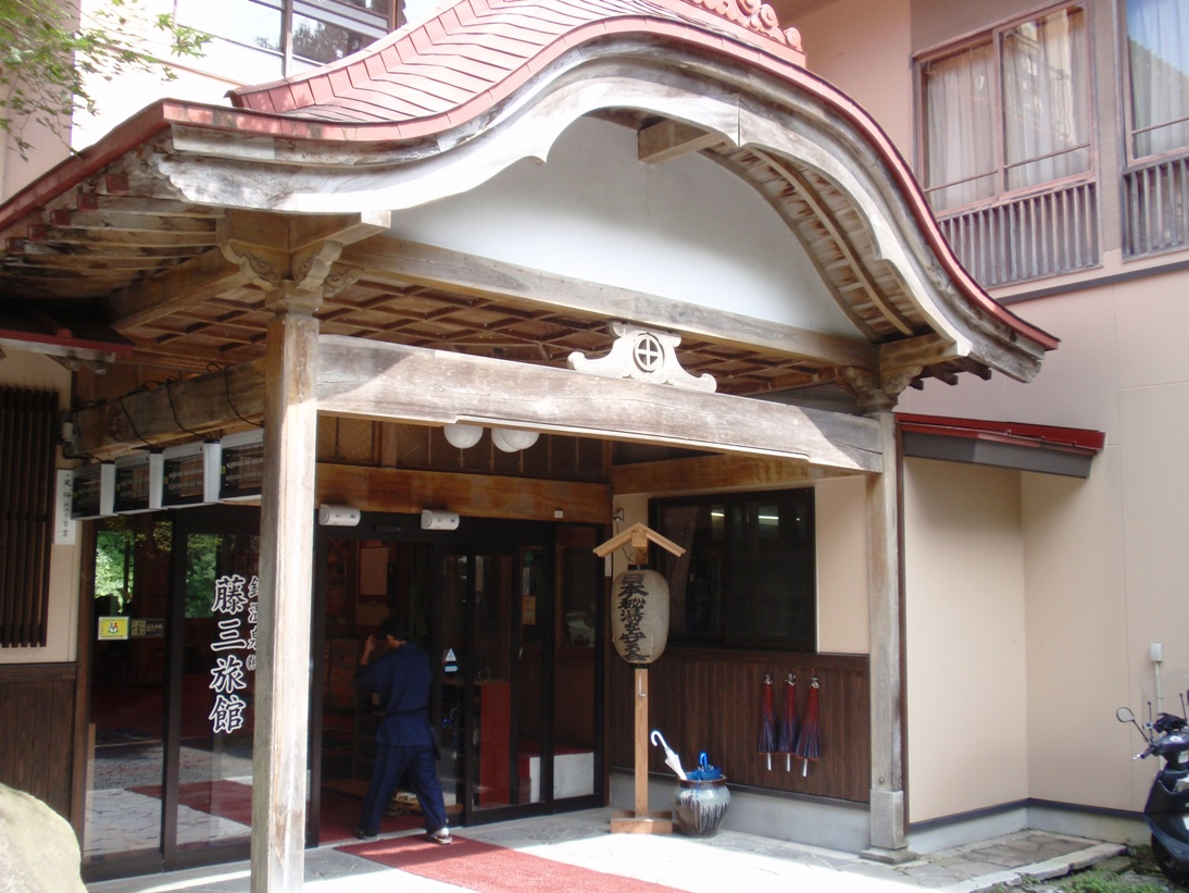 鉛温泉藤三旅館